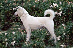 Kishu, a Japanese spitz